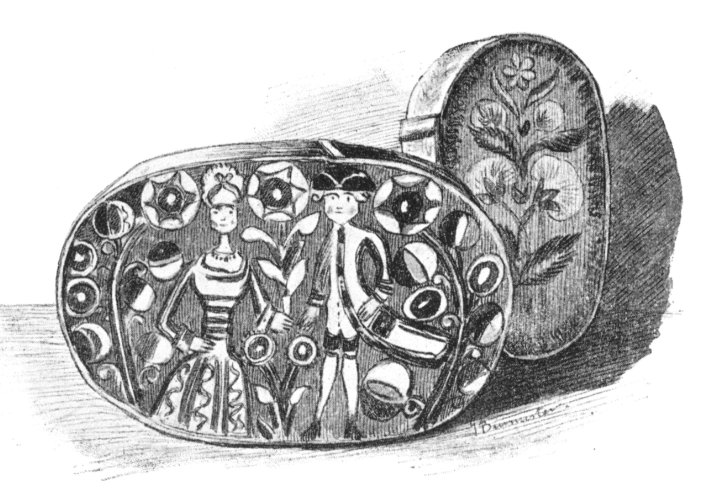 Alte Schachteln zur Aufbewahrung der Hochzeitshauben aus der Sammung des Postmeisters Friese in Lauenburg, Zeichnung um 1895 von Georg Burmester